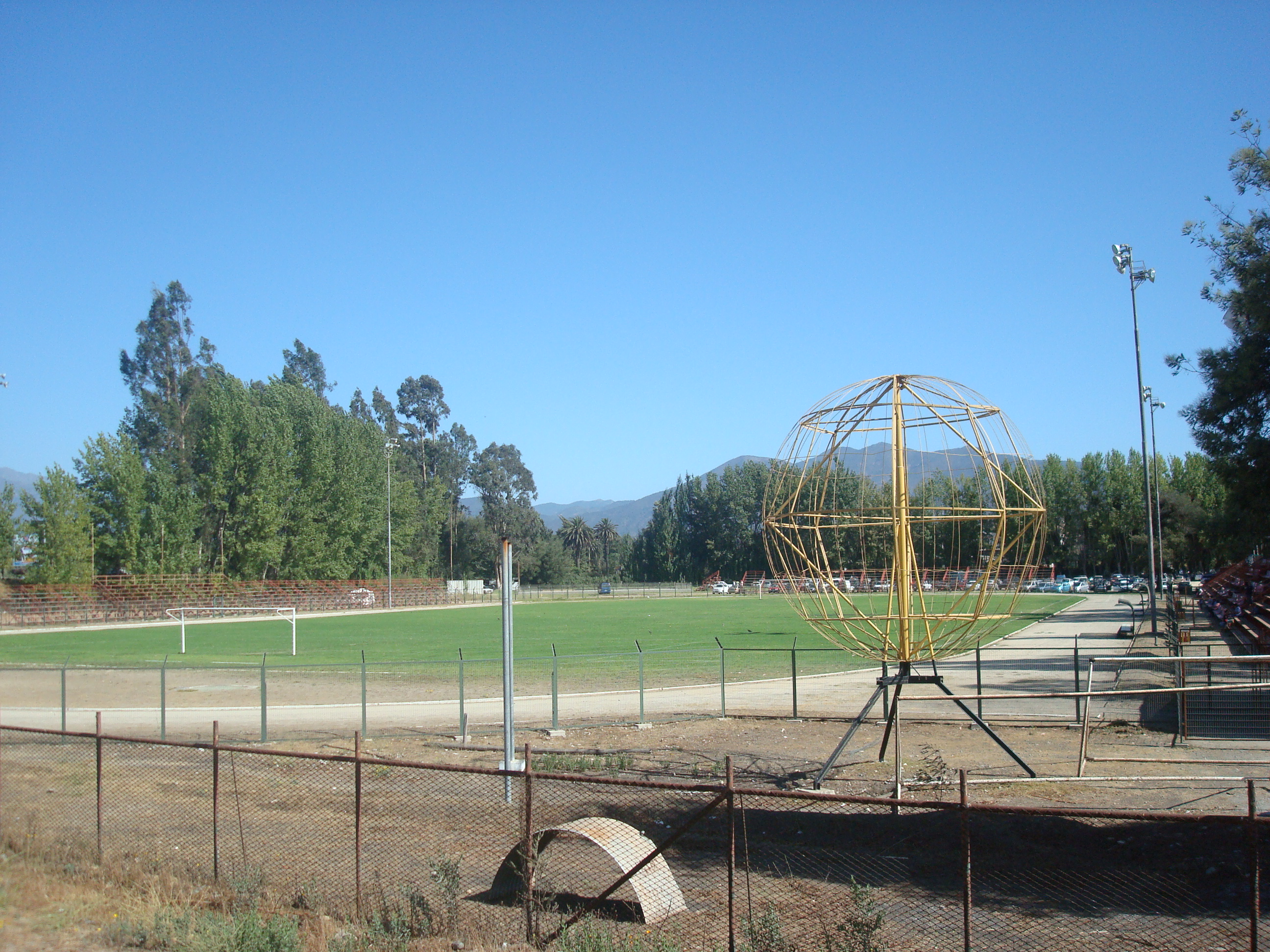 Estadio Municipal Ángel Navarrete Candia de Limache